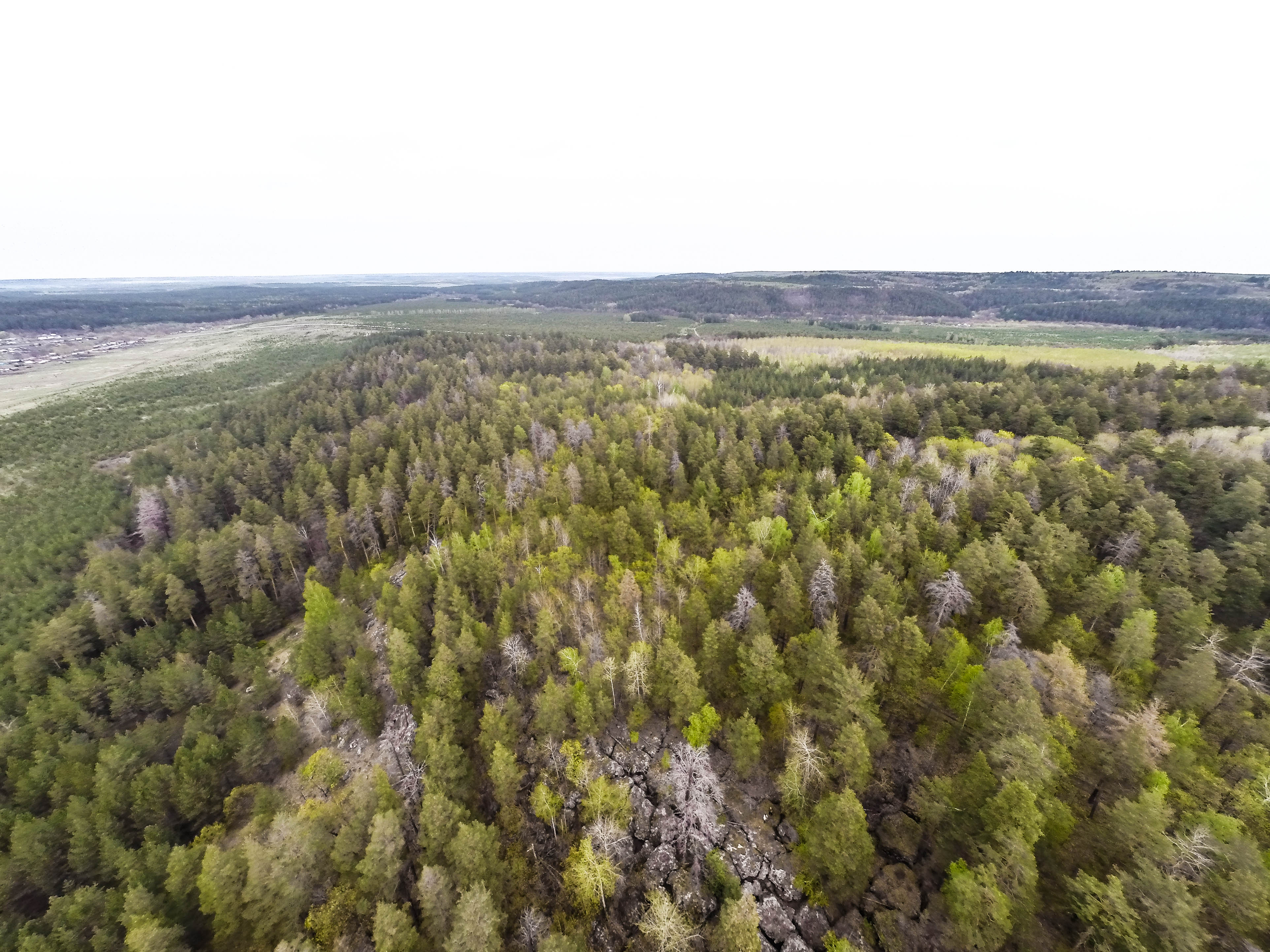 Рачейские скалы, Сызранский район This image is related to the protected area of Russia number 6310500